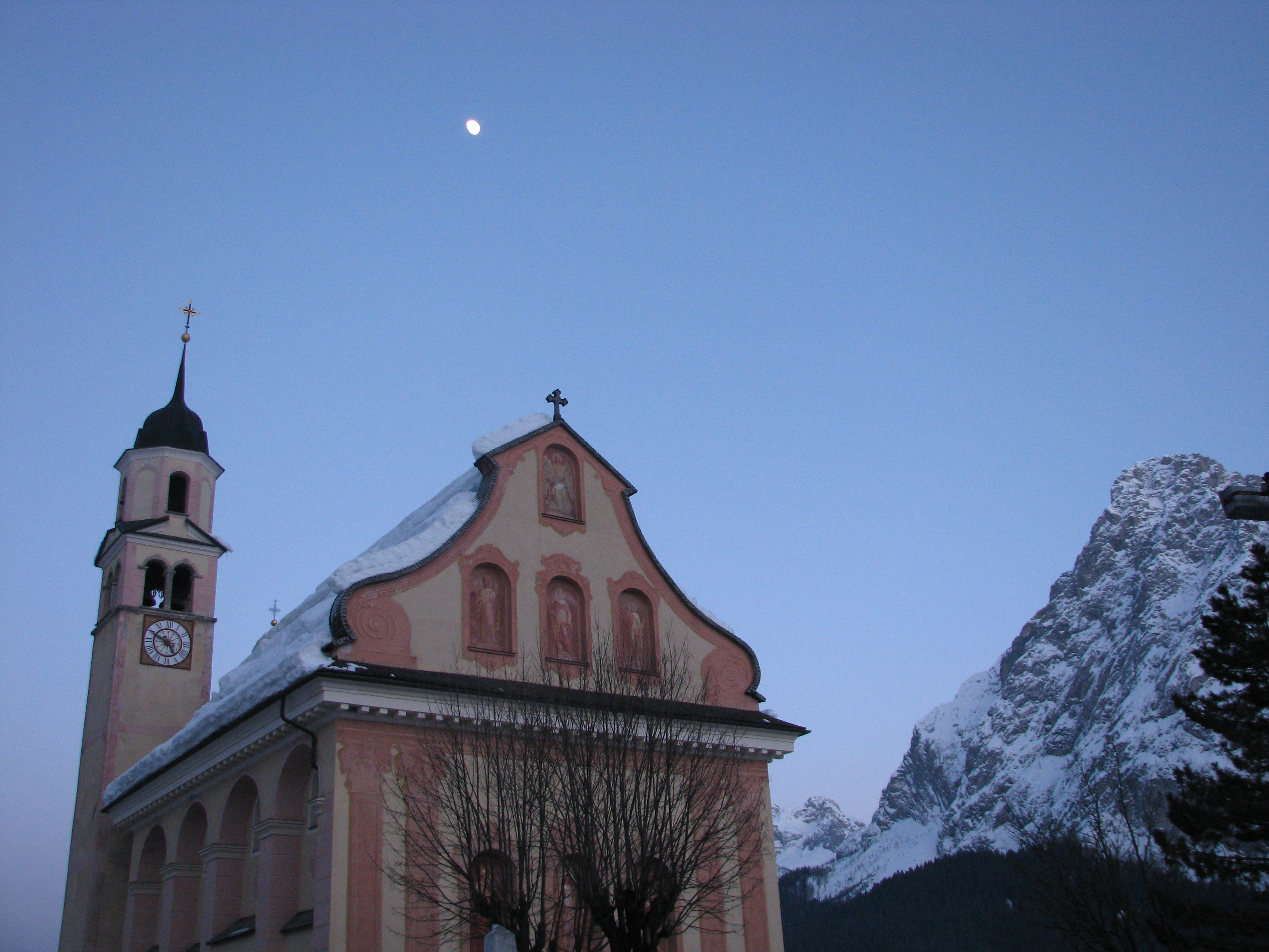 Sappada crkva